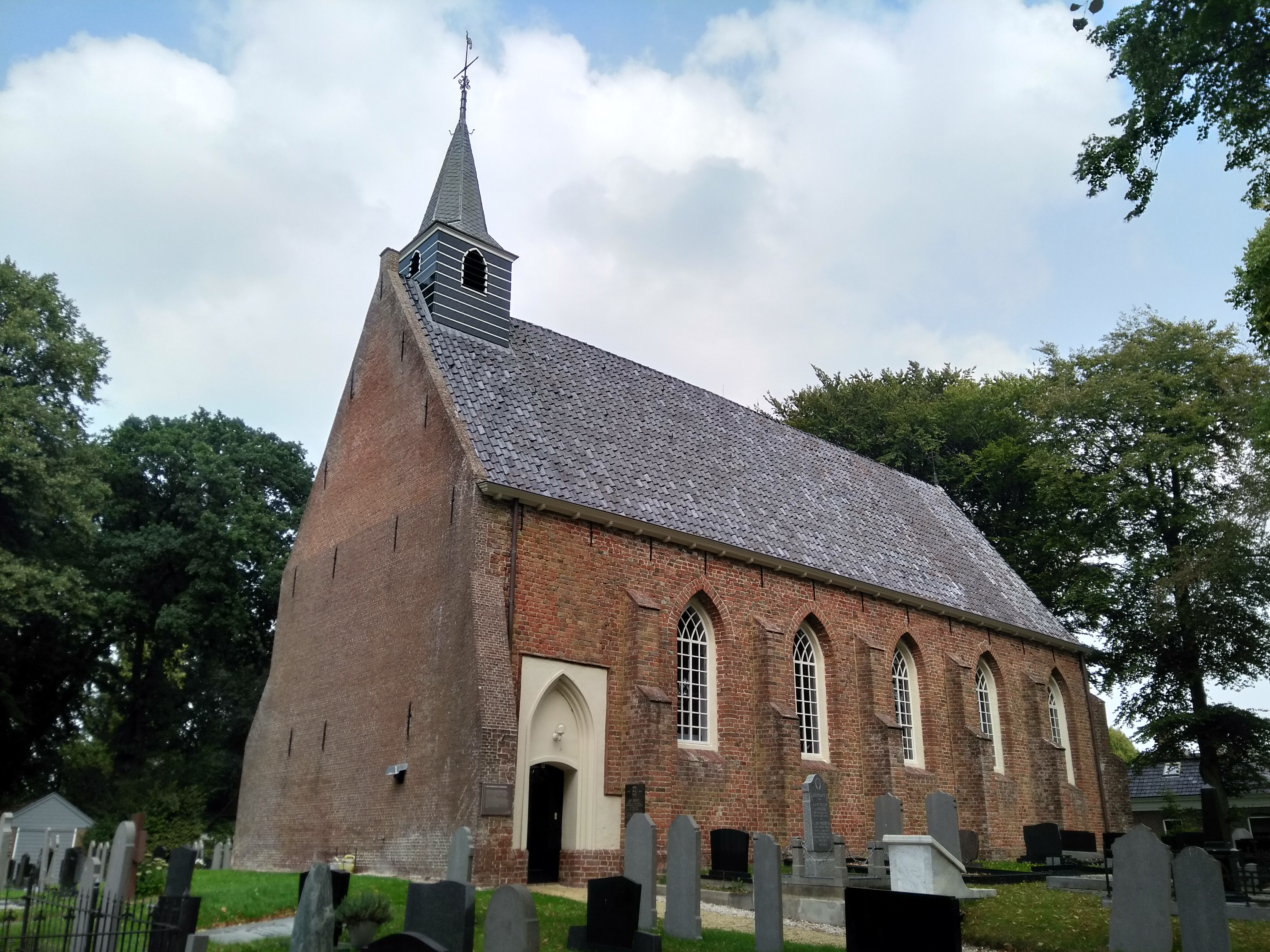 15e-eeuwse kerk van Oudwoude vanuit het zuidwesten.